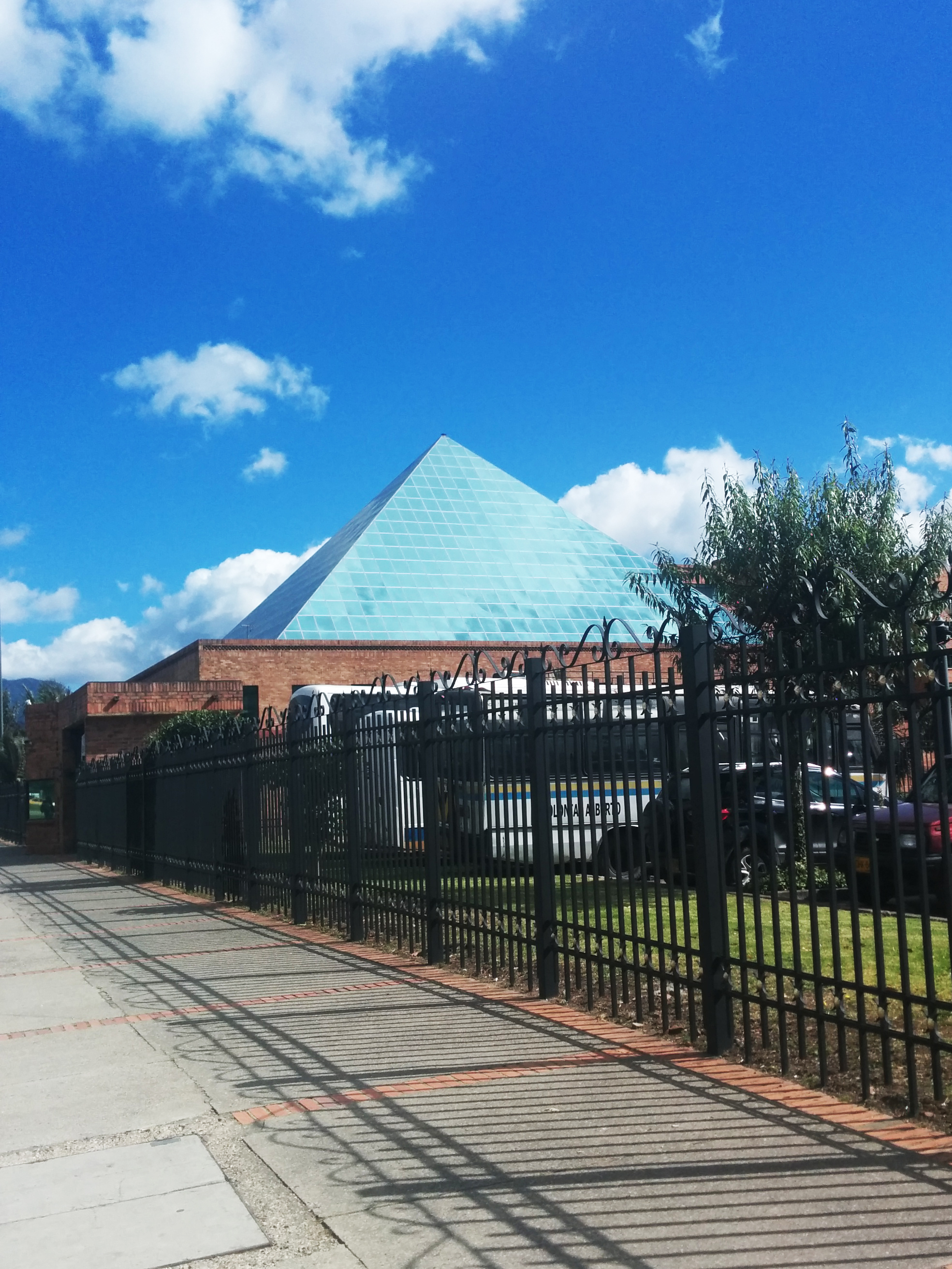 Ubicación: BOGOTA D.C., BOGOTÁ, D. C.